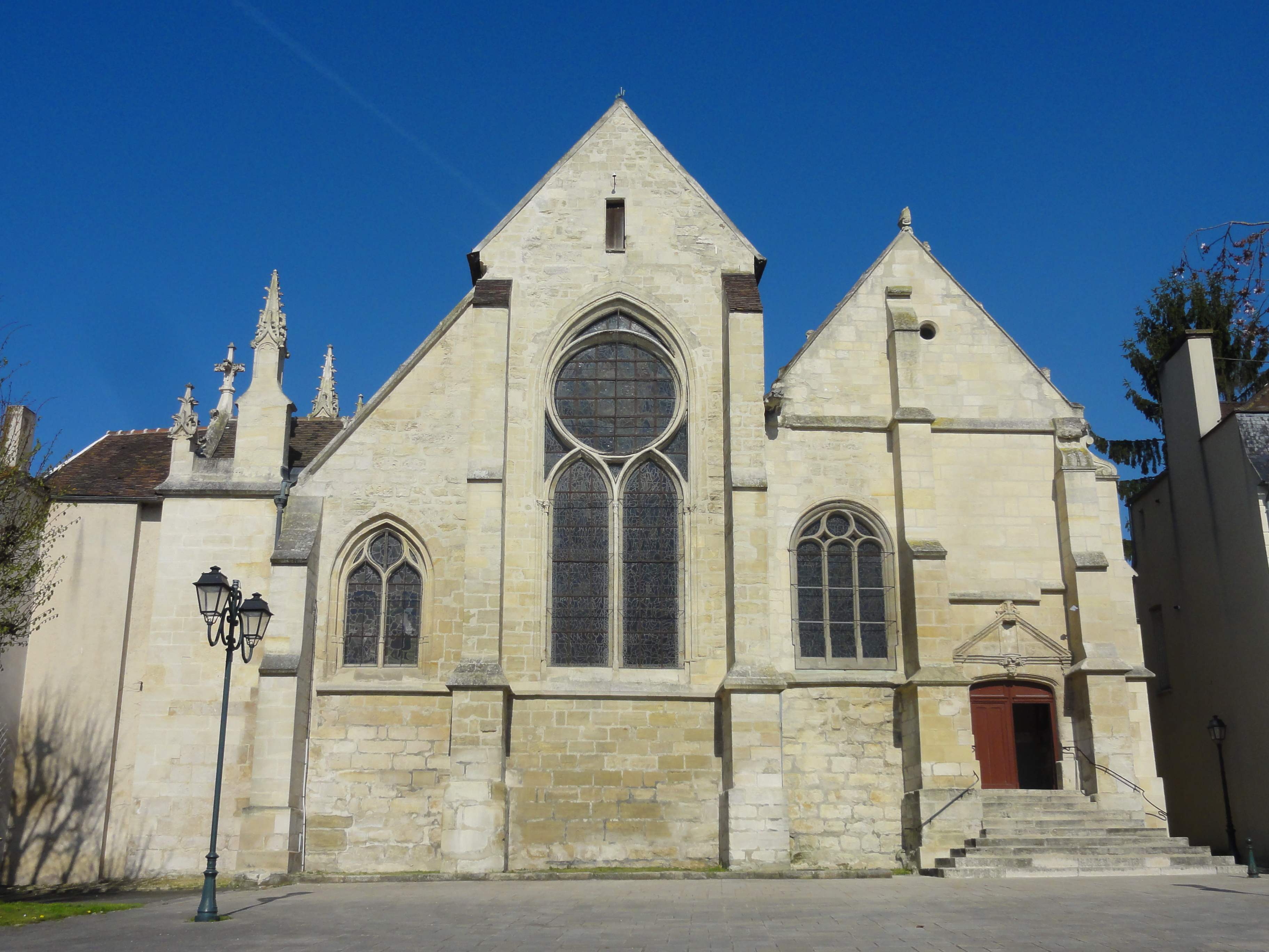 Église Saint-Germain d'Andrésy - voir titre.